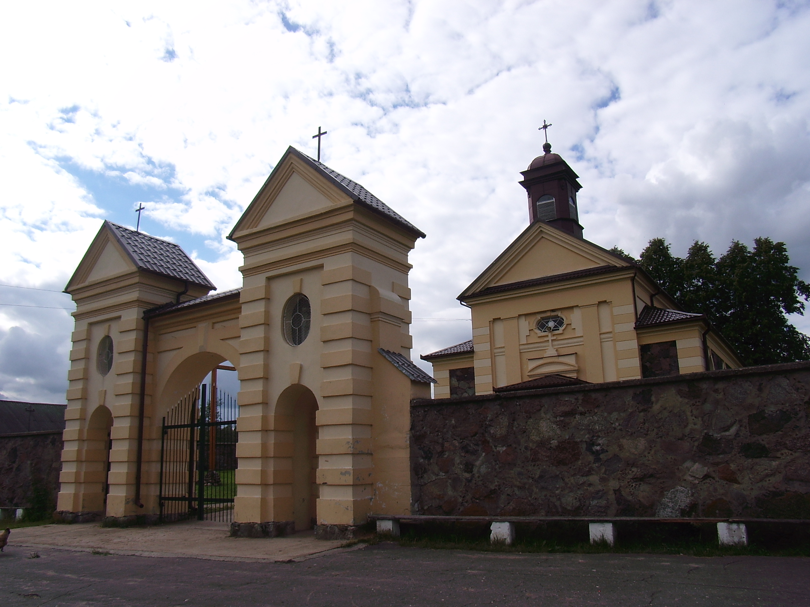 Беларуская (тарашкевіца): Касьцёл Маці Божай. в. Канстанцінава This is a photo of Belarusian heritage monument. Reference number: 613Г000654 ( WLM)